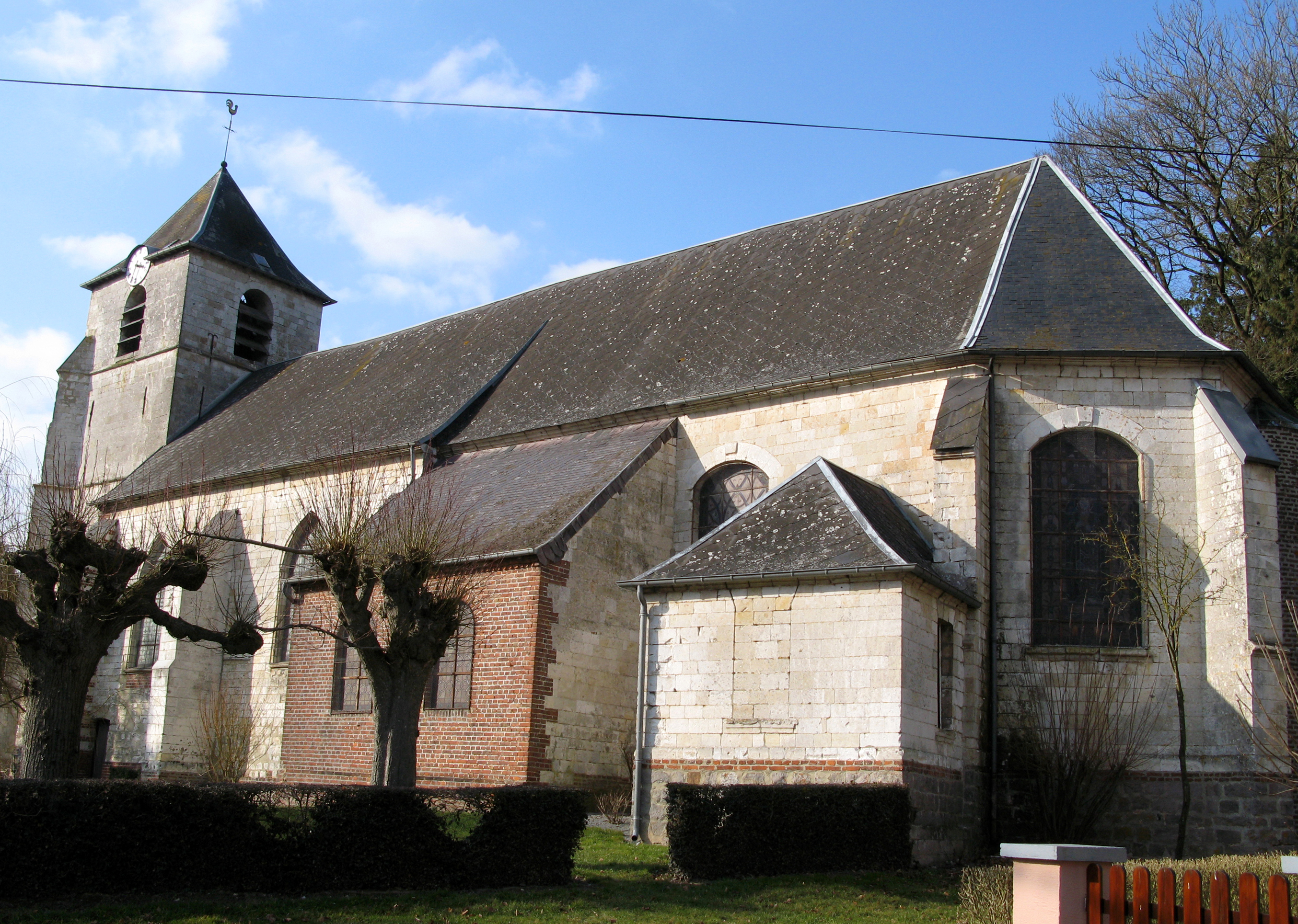 Bus-lès-Artois (Somme, France) - L'église.